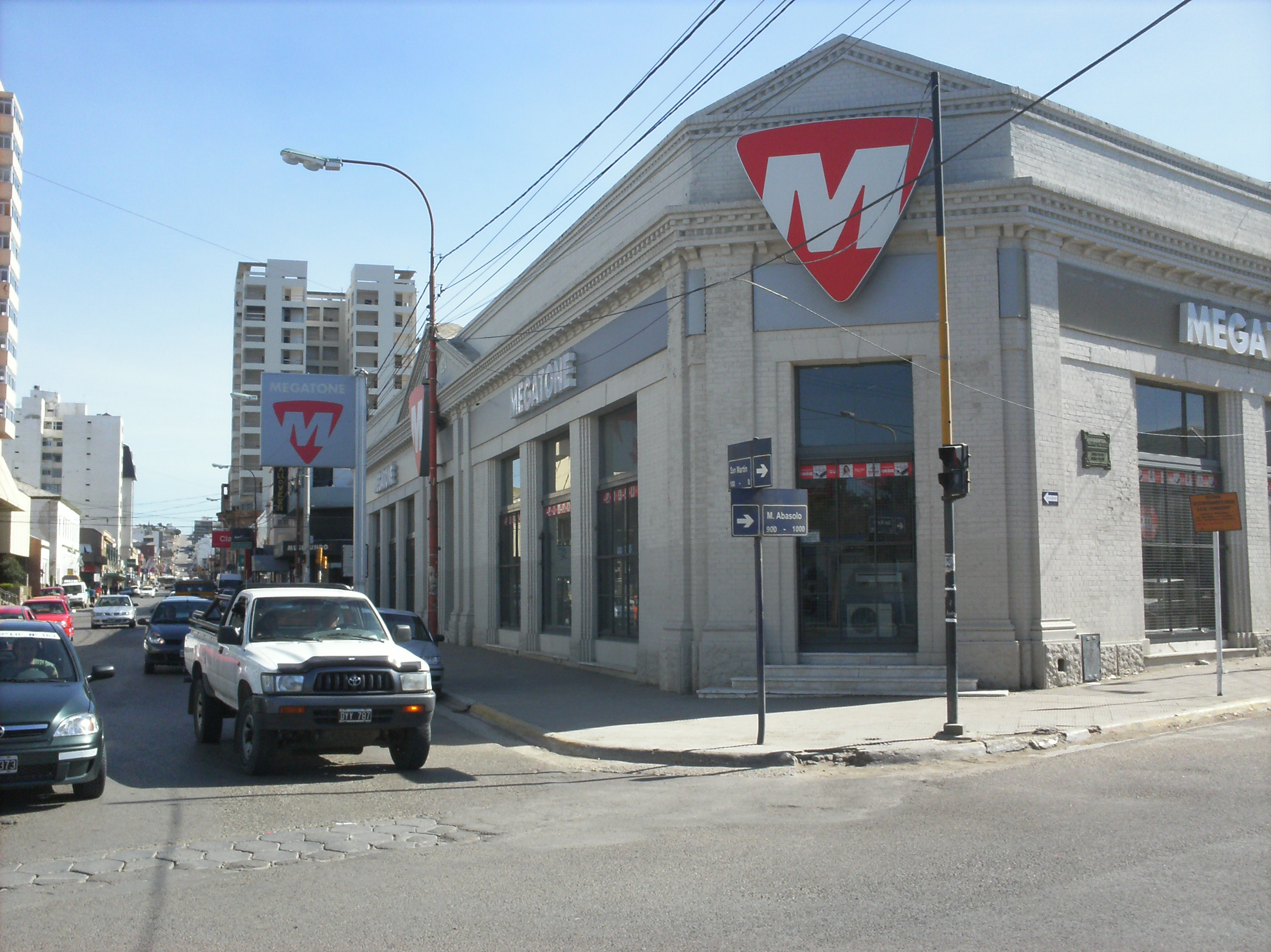 Local de la empresa de electrodomésticos Megatone en Comodoro Rivadavia.